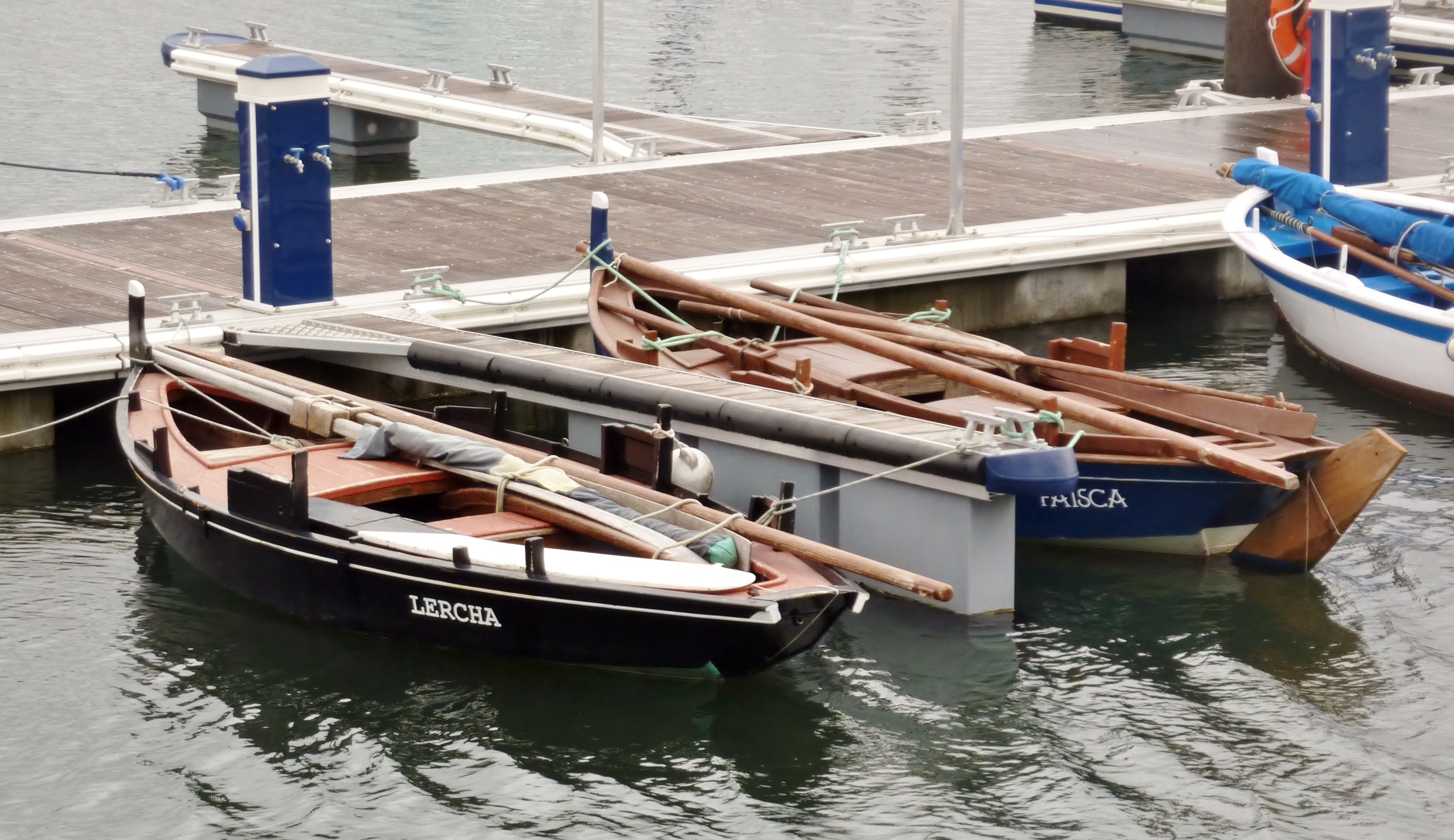 Dornas Faísca e Lercha